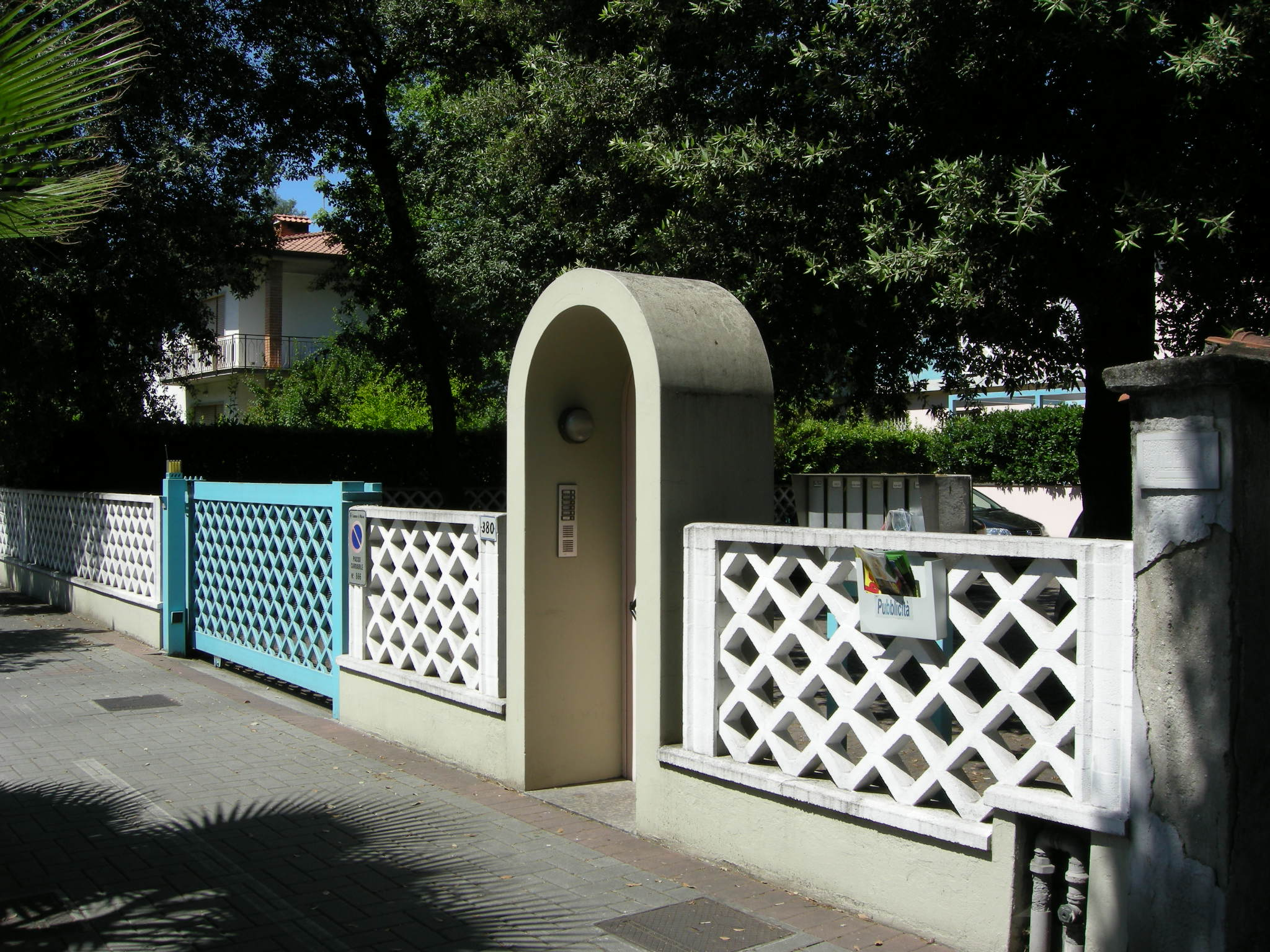 Condominio di viale roma 380 (Marina di Massa), ingresso